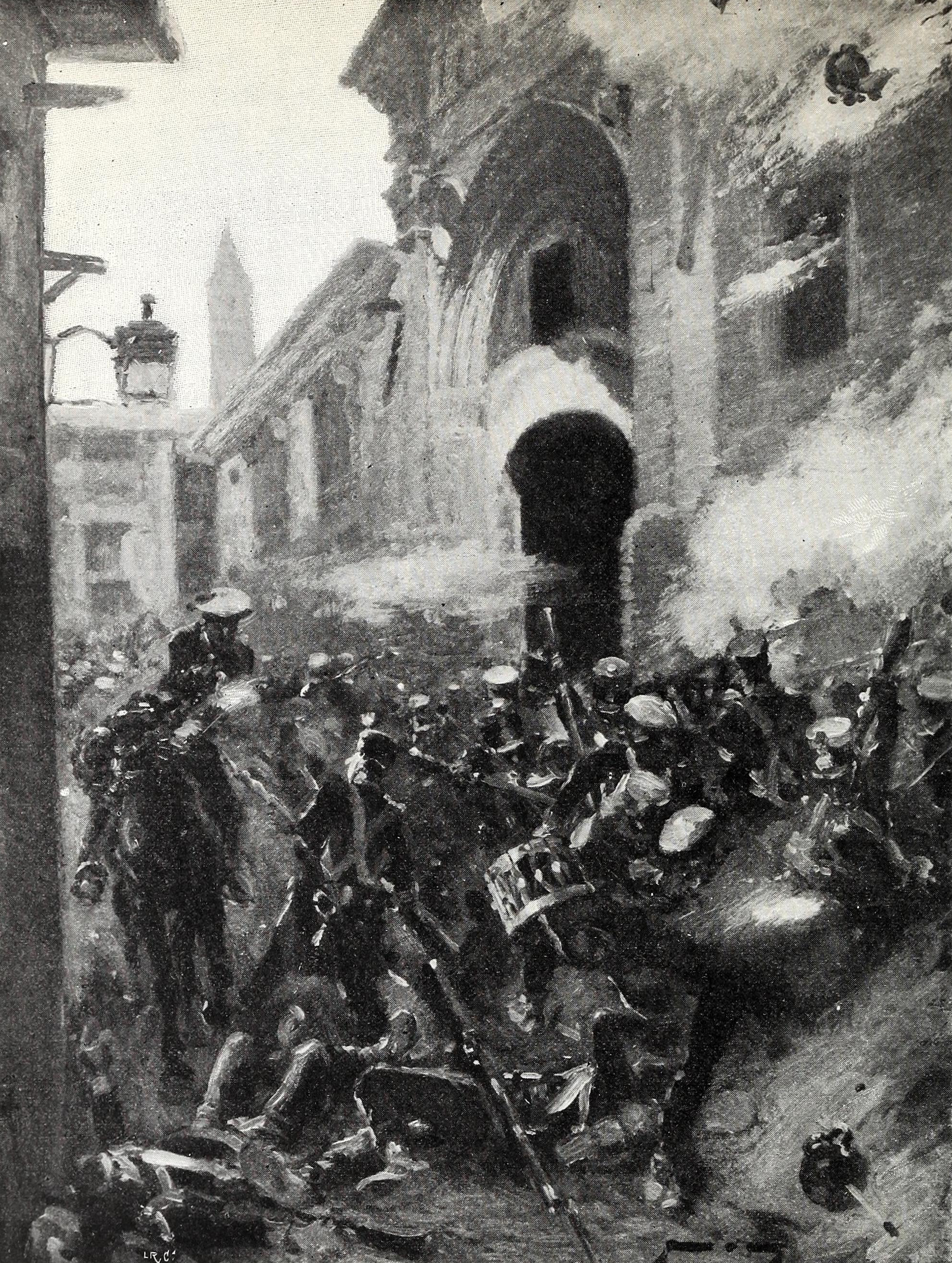 Efemérides patrióticas. Cinco de marzo de 1838.